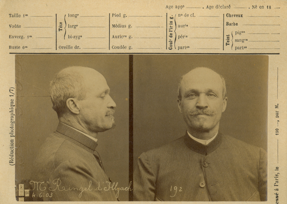 Alphonse Bertillon, Photographie anthropométrique de l'artiste Ringel d'Illzach, 4 juin 1903, photographie sur papier albuminé collée sur une fiche cartonnée imprimée (extrait). Musée d'art moderne et contemporain de Strasbourg